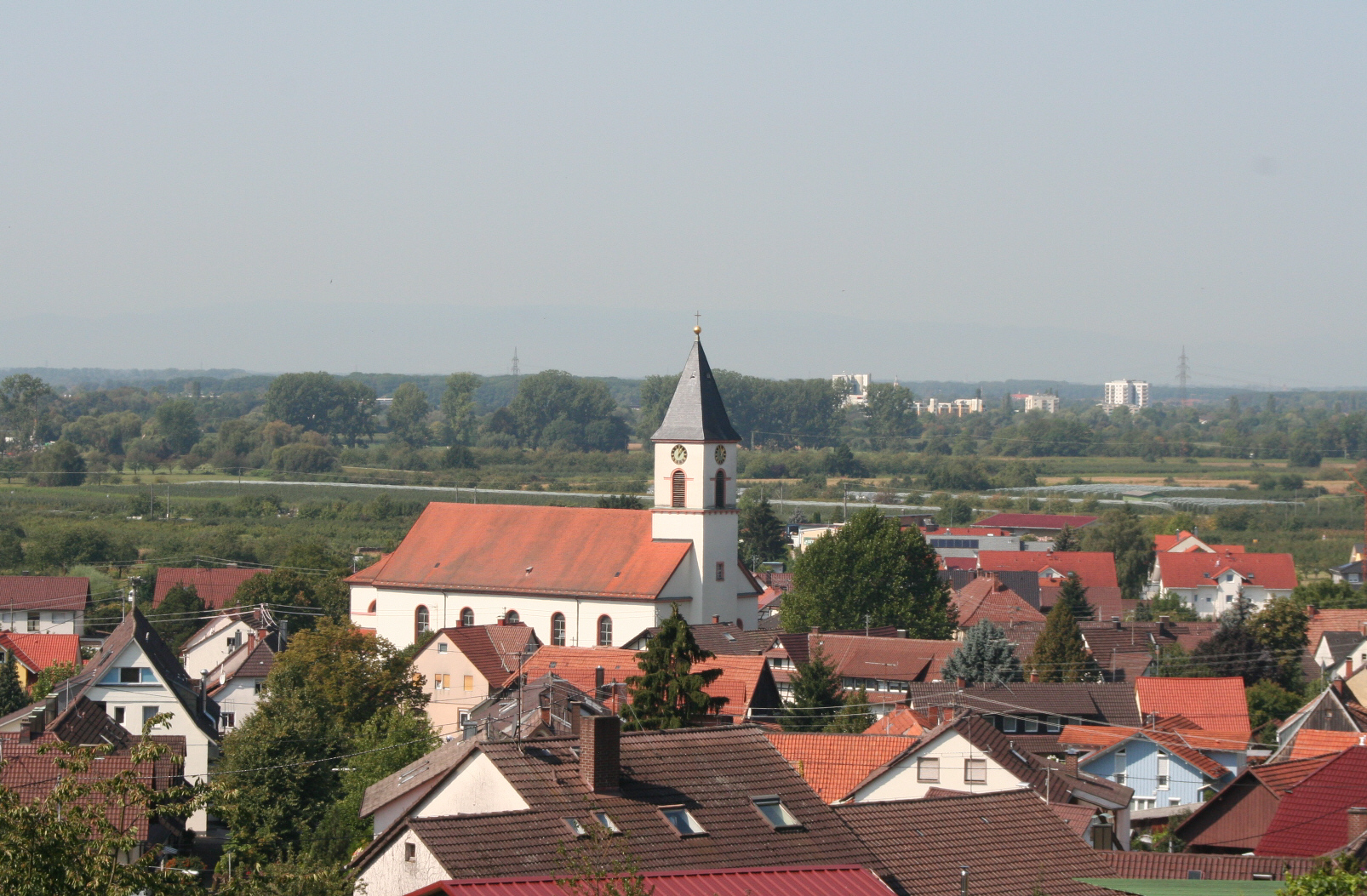 St. Bartholomäus Katholische Kirche in Ortenberg/Baden, 1821-24 nach Plänen von Baumeister Hans Voss erbaut